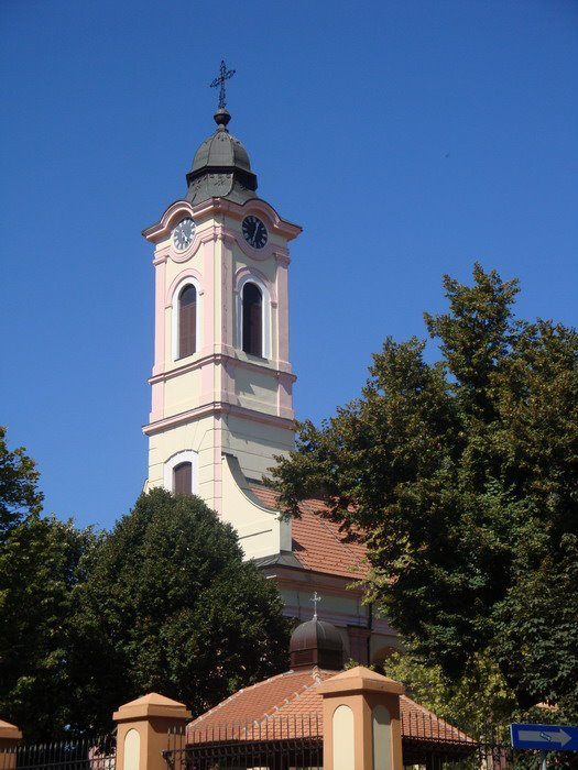 Храм Свете Тројице у Земуну